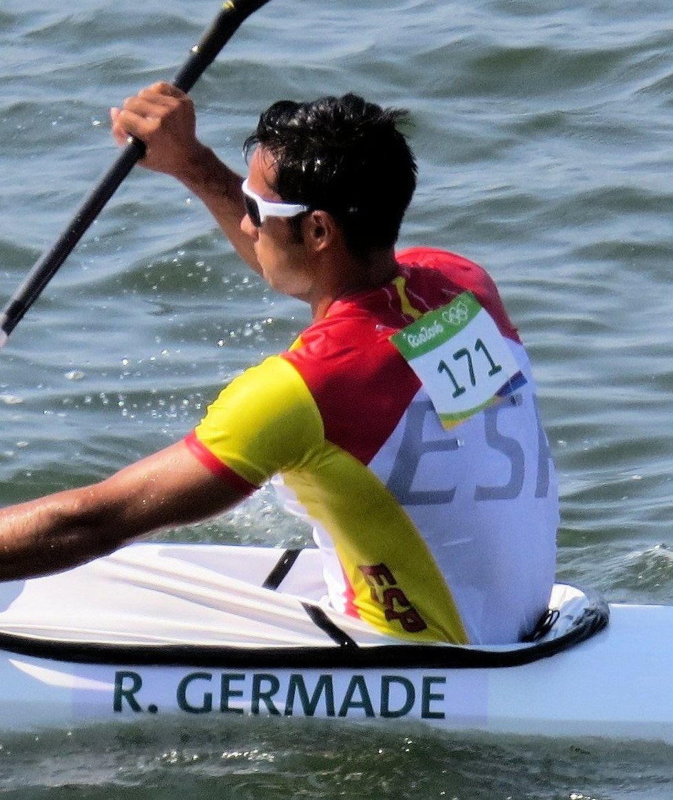 Sx50